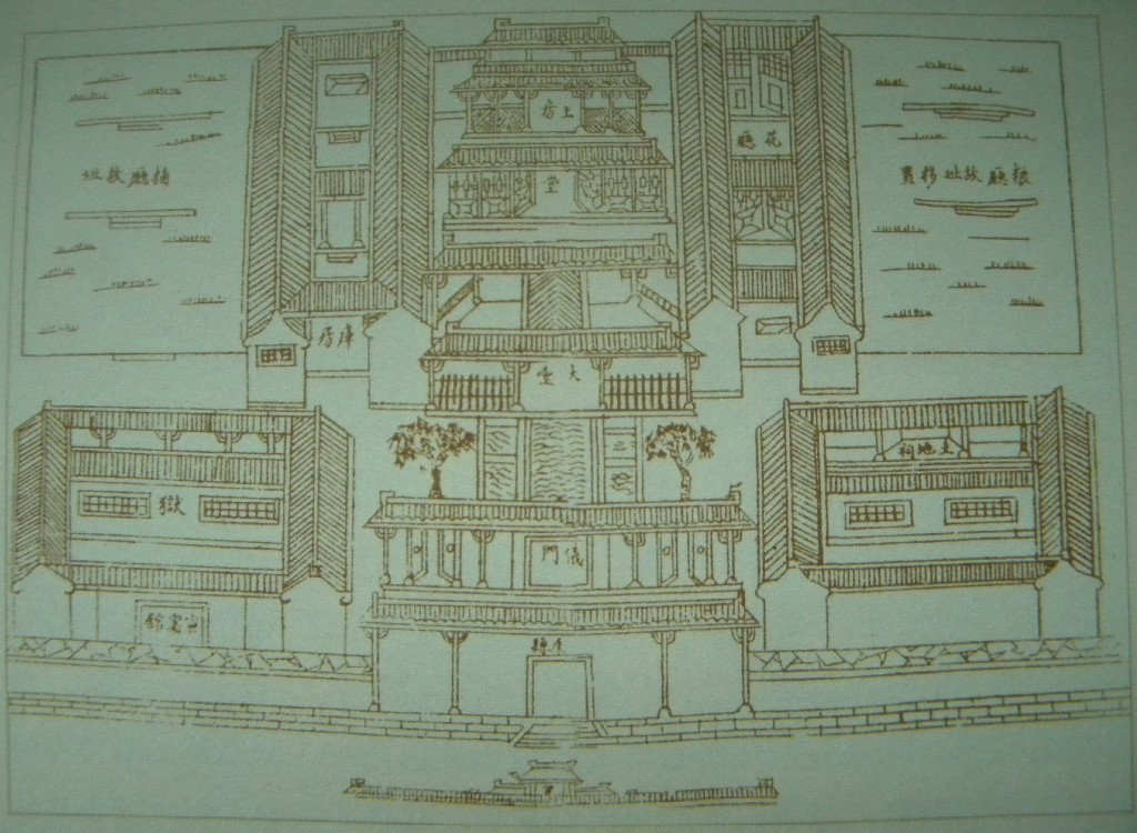 清代浙江永康县公署平面布局之图